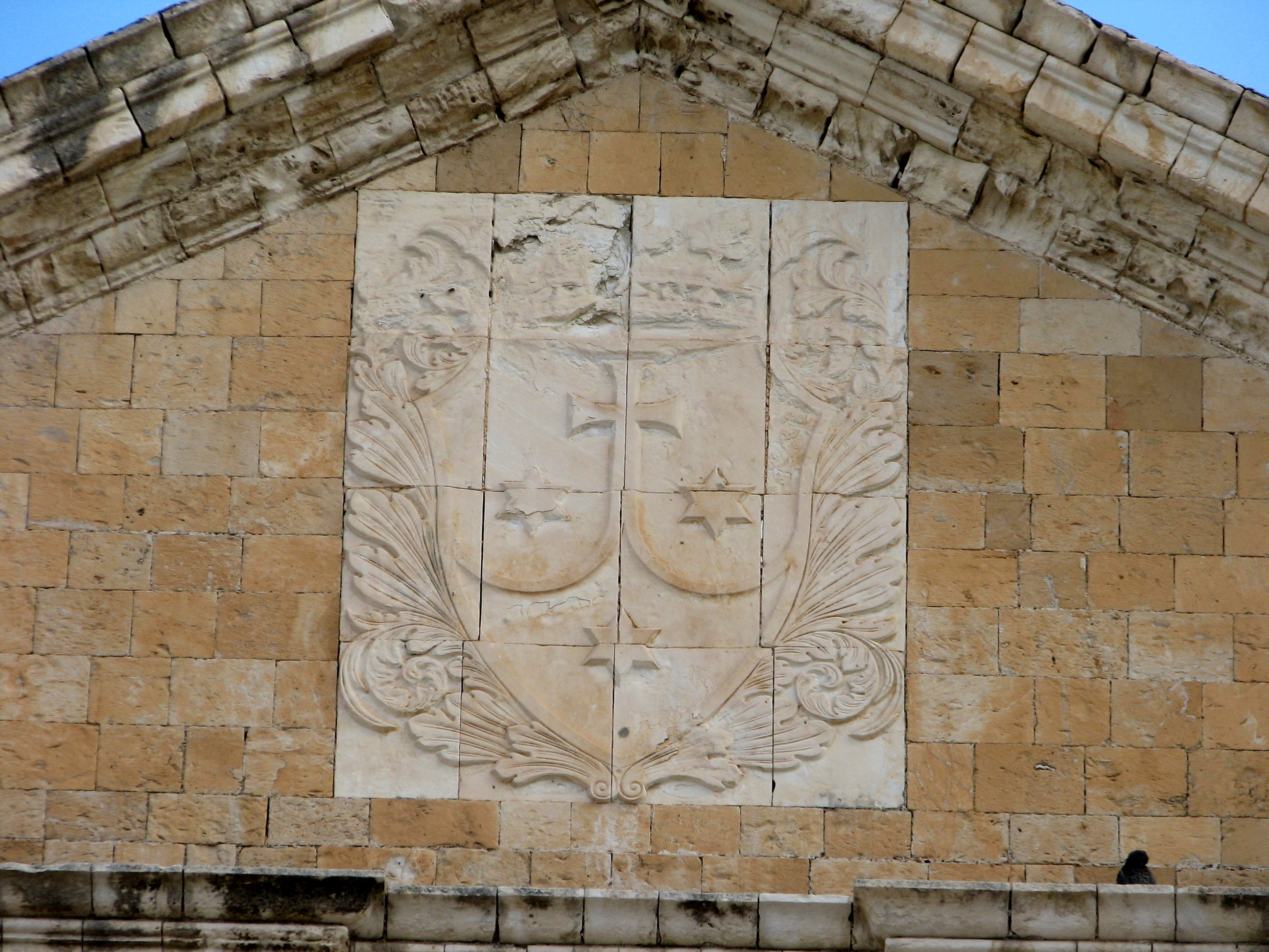 Elijah the Prophet Church, Old Carmelites church, Downtown Haifa הכנסייה הכרמליתית על שם אליהו הנביא. בעיר התחתית בחיפה. נחנכה בשנת 1867 העיר התחתית בחיפה הסמל הכרמליתי